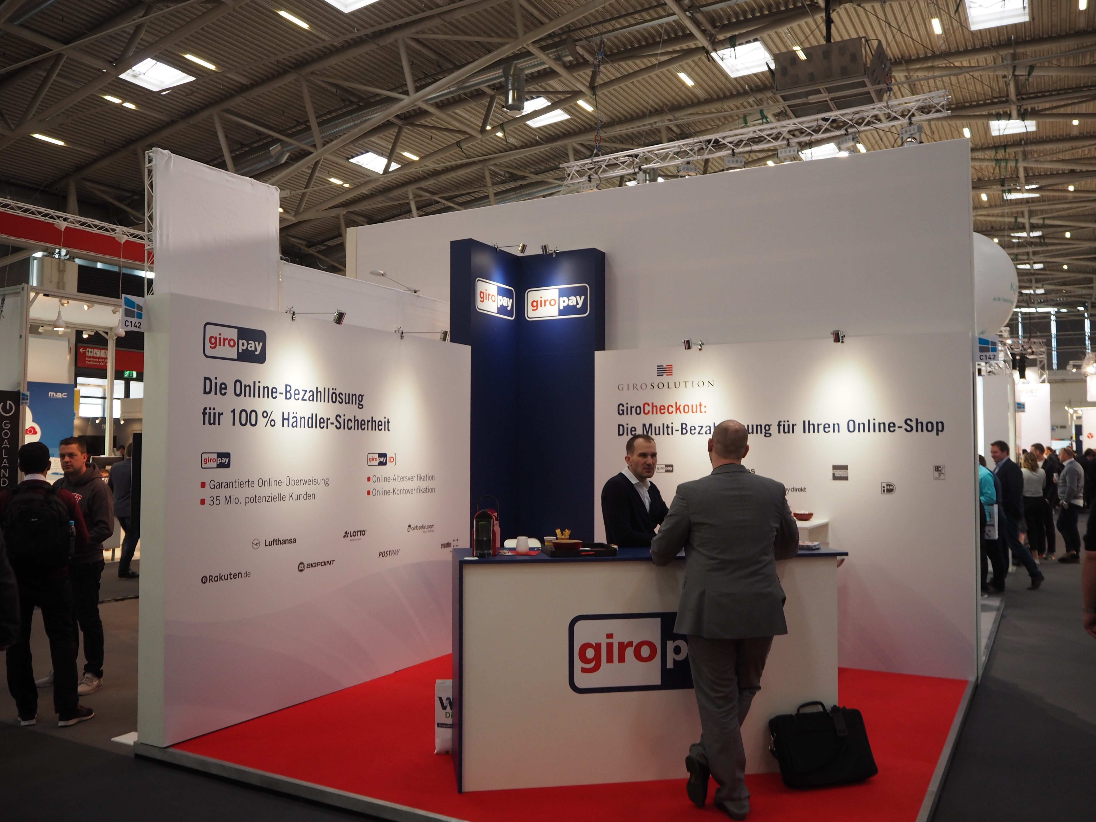 Internet World Fair 2017 in Munich, Germany, Giropay-Stand